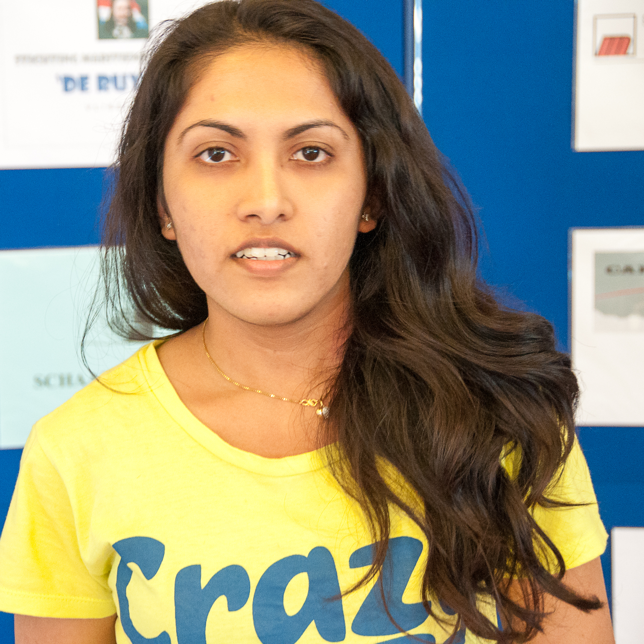 IM Eesha Karavade (2012)